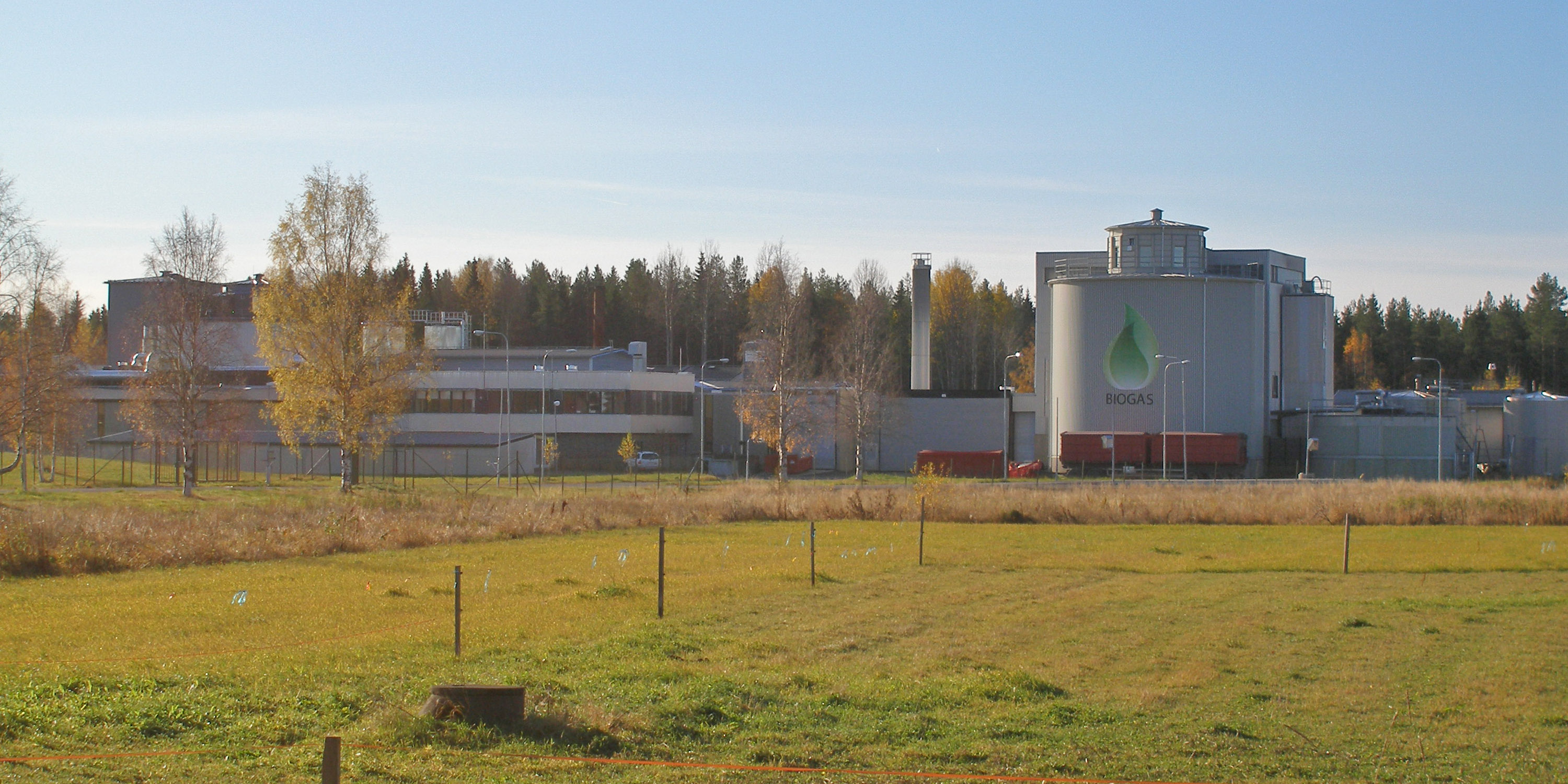 Skellefteå kommuns biogasverk och reningsverk i södra Tuvan, Skellefteå.